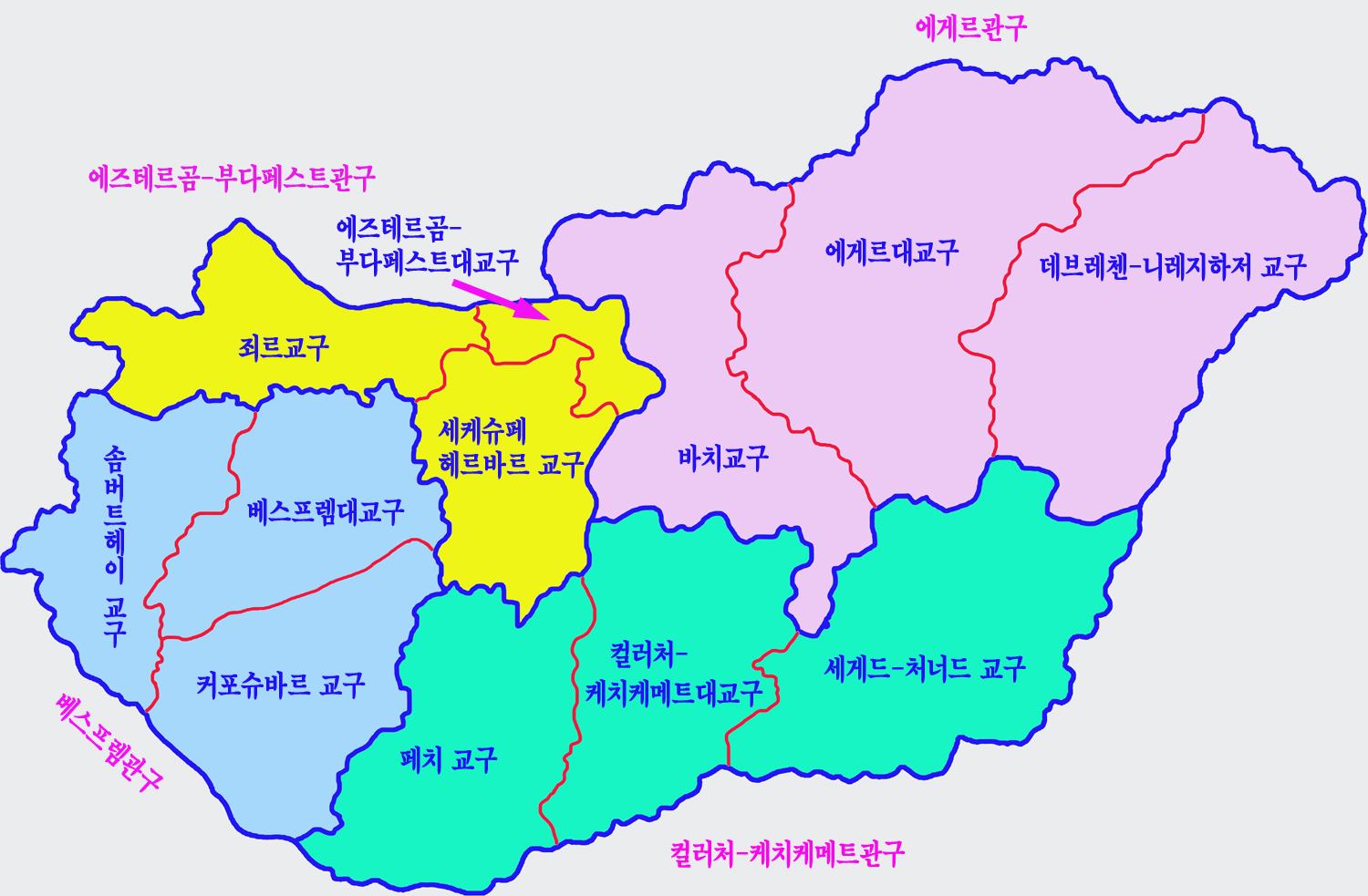 헝가리 가톨릭교구도